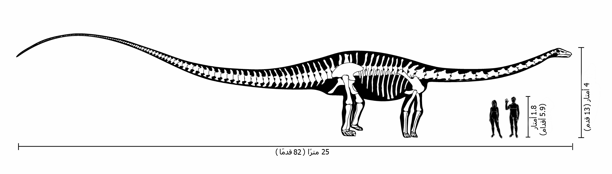 رسم توضيحي يُظهر حجم الديناصور الطويل "الديبلودوكس" مقارنة بحجم الإنسان.